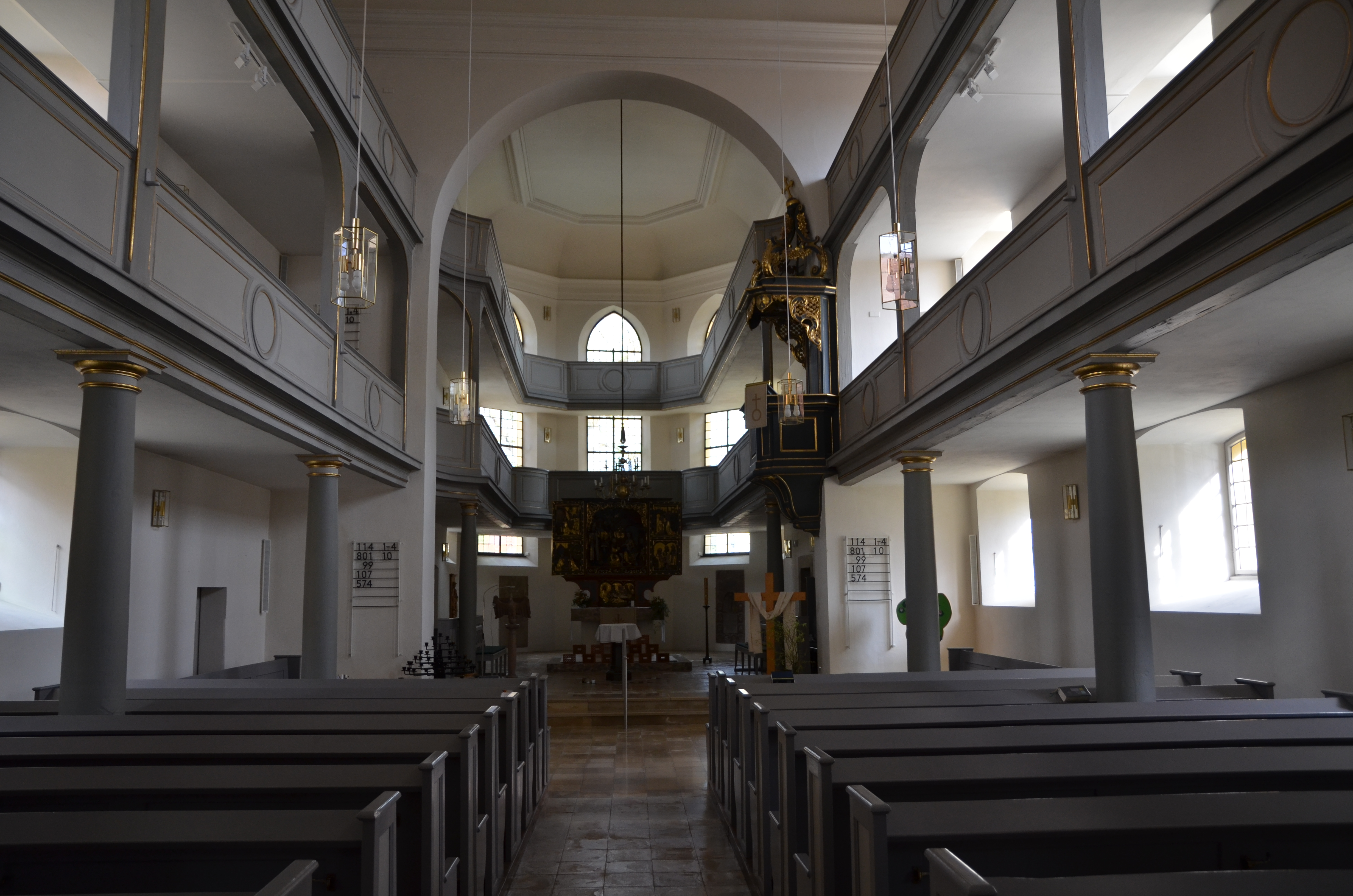 evang.-luth. Kirche St. Maria in Ostheim evang.-luth. Stadtkirche in Wassertrüdingen